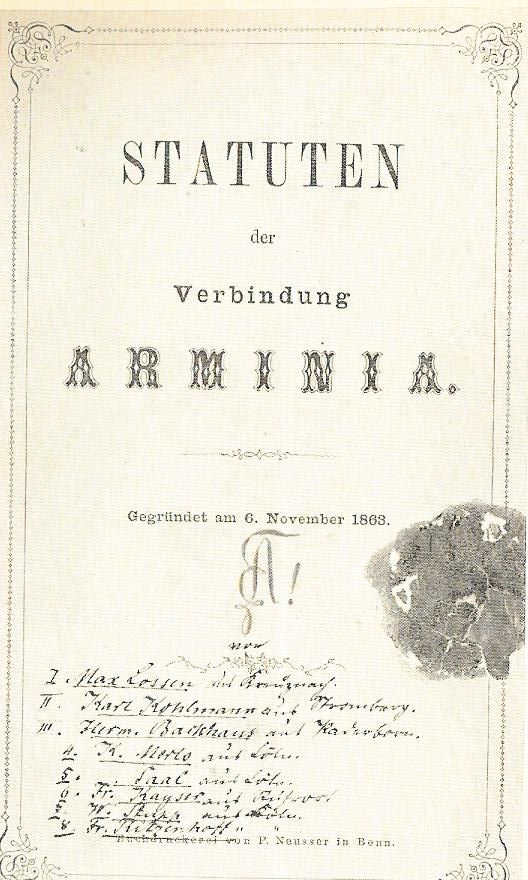 Älteste gedruckte Satzung des KStV Arminia Bonn Sonstiges